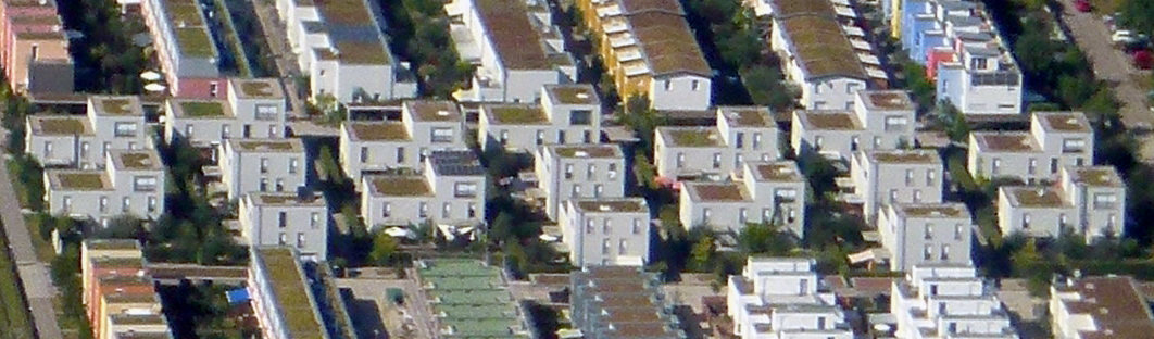 Blick auf das Quartier 4 mit 17 Doppelhäusern im Scharnhauser Park vom Flugzeug, Ostfildern